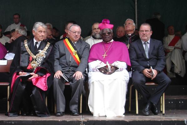 Monseigneur Laurent Monsengwo and Paul Breyne